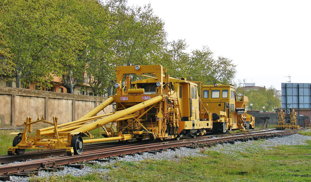 Vehículos de mantenimiento de vía en el Museu del Ferrocarril de Catalunya. En primer plano, una bateadora-niveladora-alineadora BNRI-80.